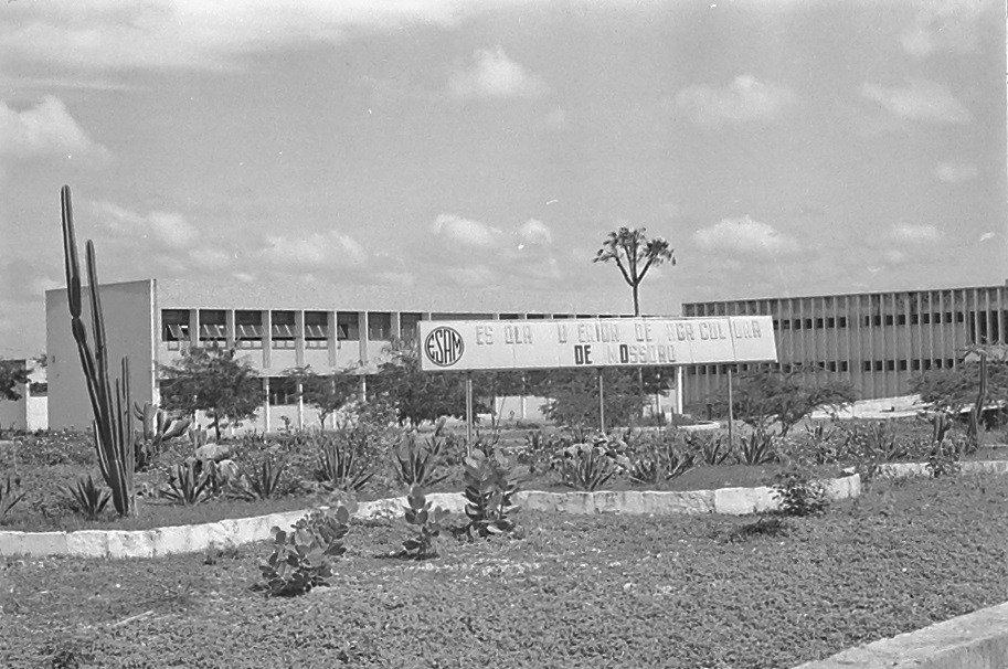 Imagem do Fundo Agência Nacional, do Arquivo Nacional